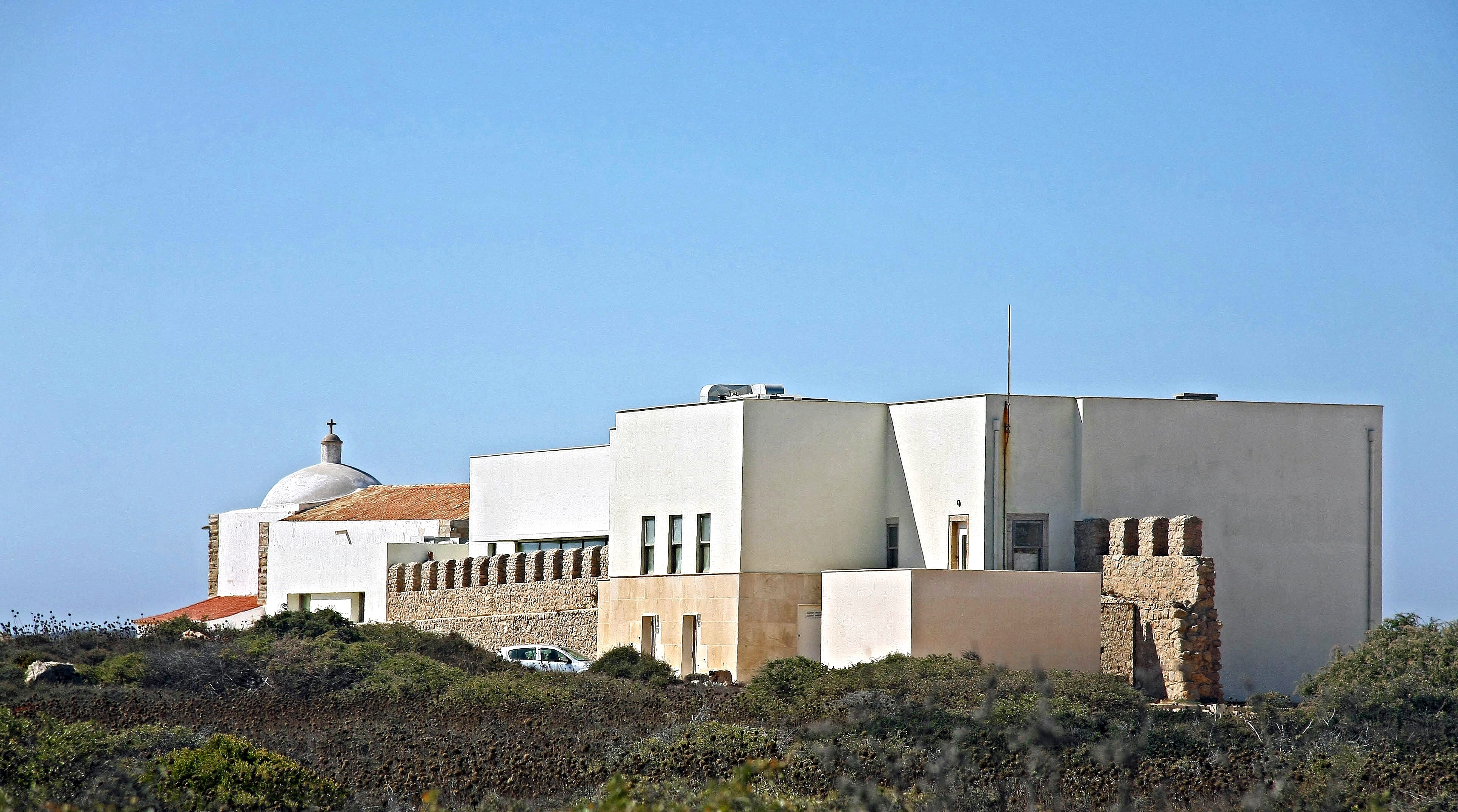 Sagres, zona de cruzamento de rotas entre o mar Mediterrâneo e o oceano Atlântico, porto de pescadores e comerciantes de várias nações, mas também, zona assolada por corsários. A imponente fortificação de Sagres é o prolongamento humano do rochedo natural e foi durante séculos a principal praça de guerra de um sistema defensivo marítimo geo-estratégico. A política da Expansão portuguesa nos séculos XV e XVI levou à fundação da Vila do Infante. Assim, Vila do Infante e Sagres confundem-se no desenrolar dos tempos. Integrando o Parque Natural do Sudoeste Alentejano e Costa Vicentina, o Promontório de Sagres apresenta uma interessante biodiversidade faunística e florística e endemismos únicos que todos os visitantes podem observar. Sagres, lugar de memória onde a natureza, o sagrado e o homem se conjugaram desde sempre de forma simbiótica, geradora de cultos religiosos e mitos históricos, políticos, turísticos merece a sua visita!